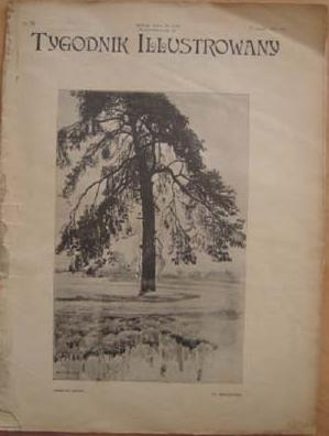 Strona tytułowa "Tygodnika Illustrowanego", nr 33, 17 sierpnia 1912.; Format: 29x39; Oprawa: brak okładek; Str. od 681 do 700.